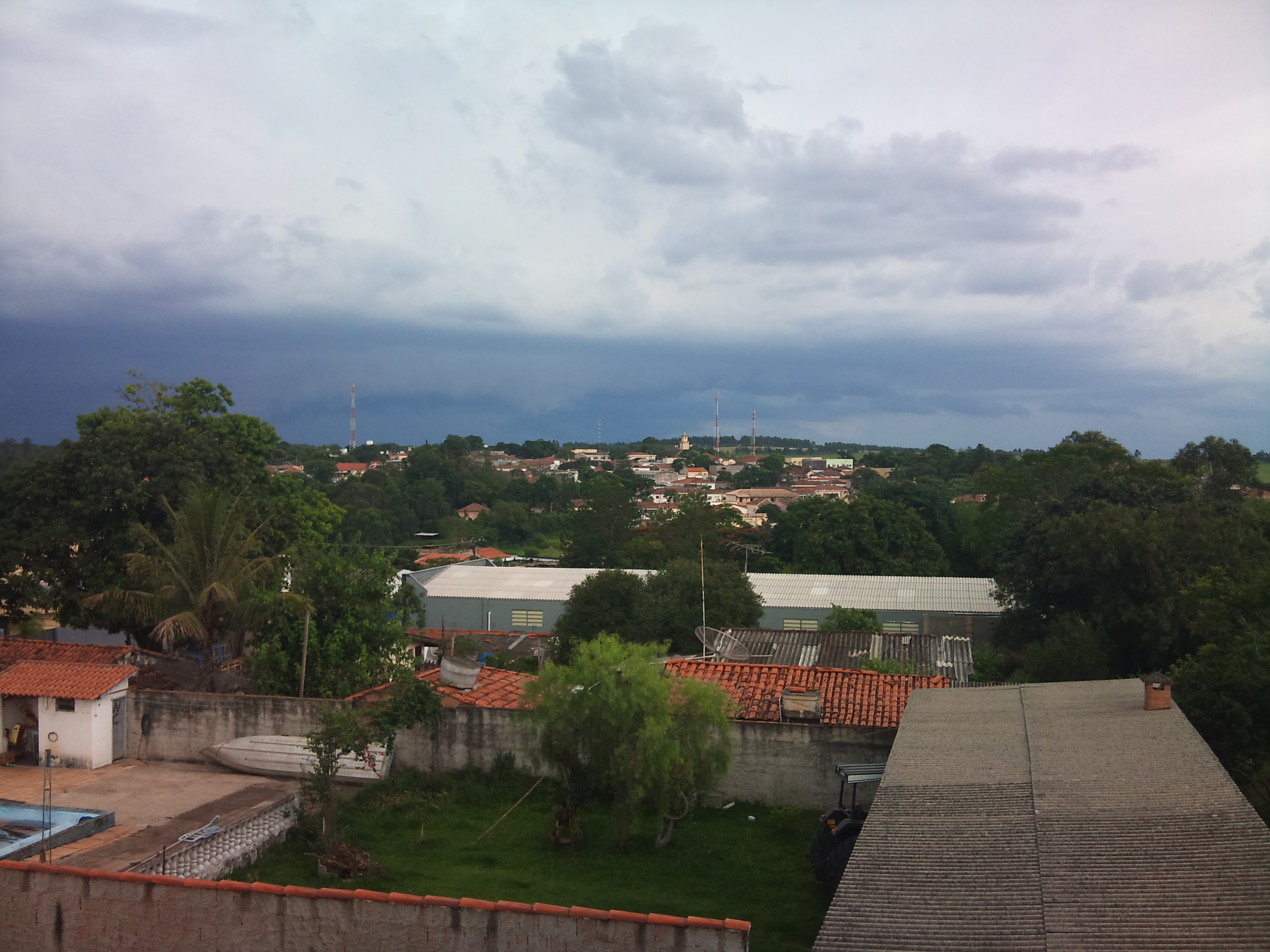 Elias Fausto